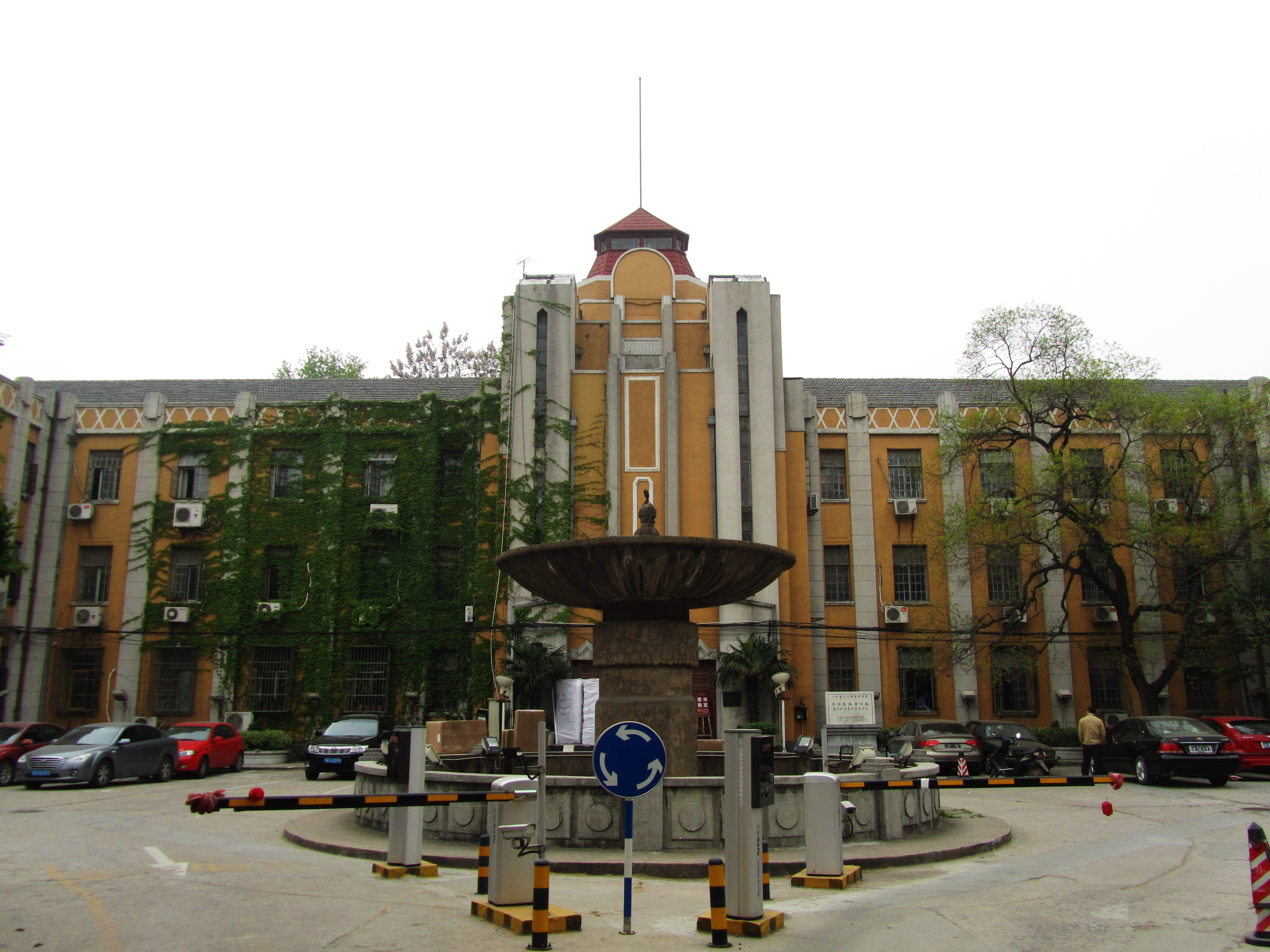 原国民政府最高法院旧址，主楼东北侧。